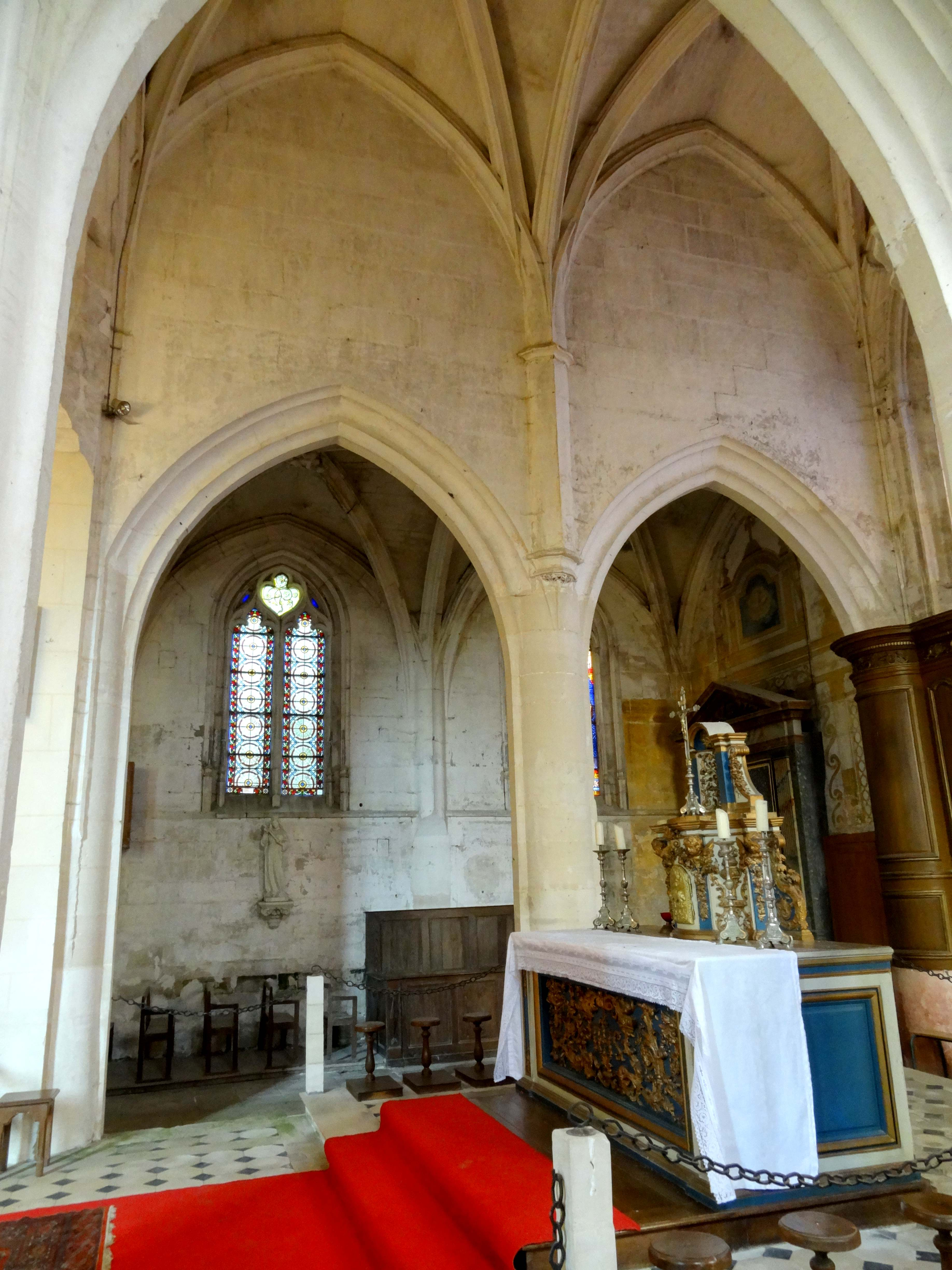 Intérieur de l'église - voir titre.